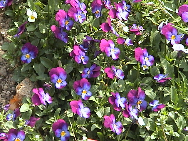 Hornveilchen (Viola cornuta)